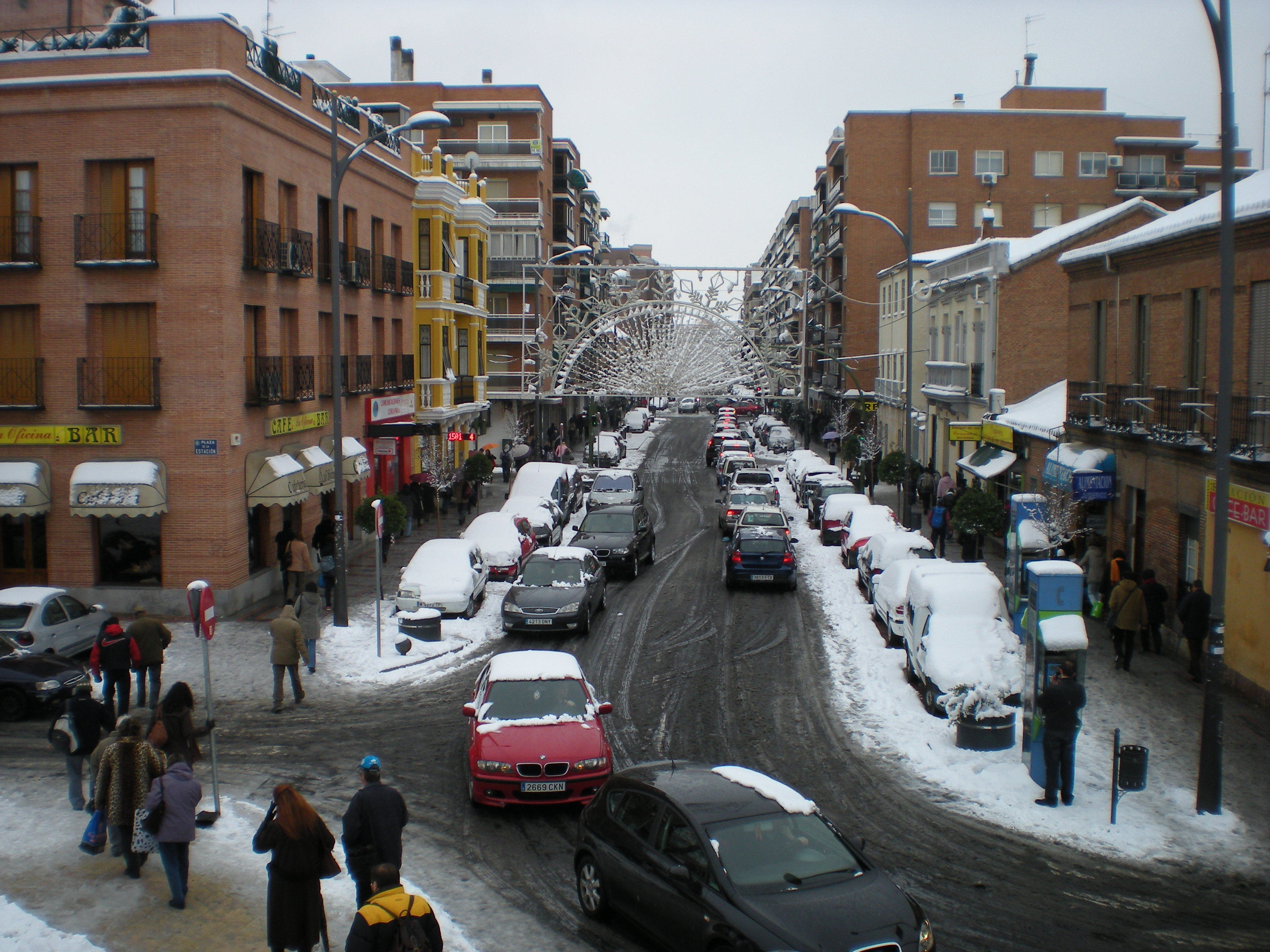 Paseo de la Estación. Alcalá de Henares Comunidad de Madrid España